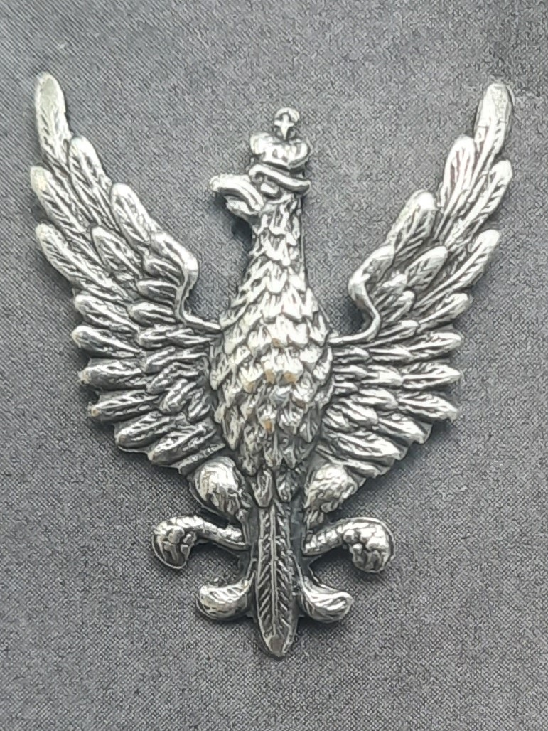 Orzełek przypinany do patek kołnierza munduru - znak oficerów dyplomowanych (II RP). Pamiątka po gen. bryg. Stefanie Kosseckim.